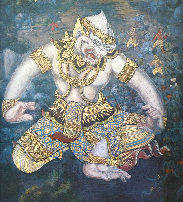 Hanuman from mural painting in Wat Phra Kaeo, Bangkok. Taken in 2007.